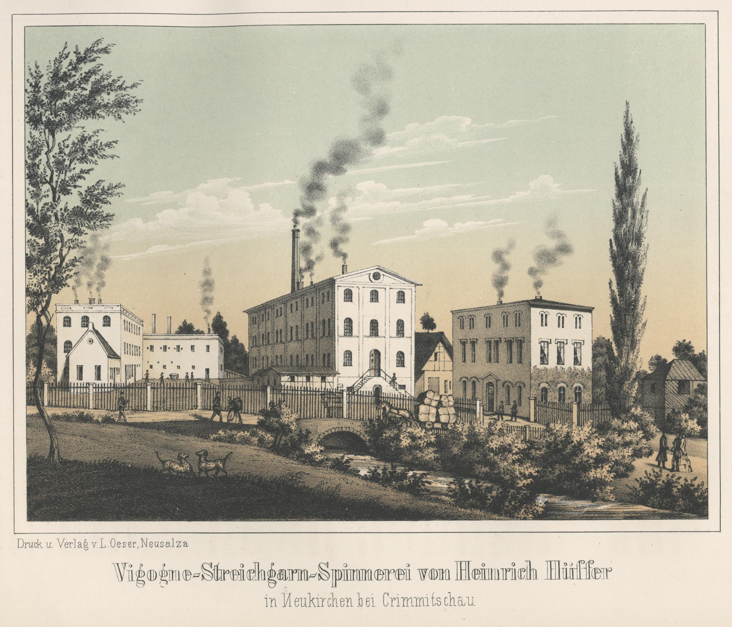 Vigogne-Streichgarn-Spinnerei von Heinrich Hüffer in Neukirchen bei Crimmitschau aus: Album der Sächsischen Industrie Erster Band